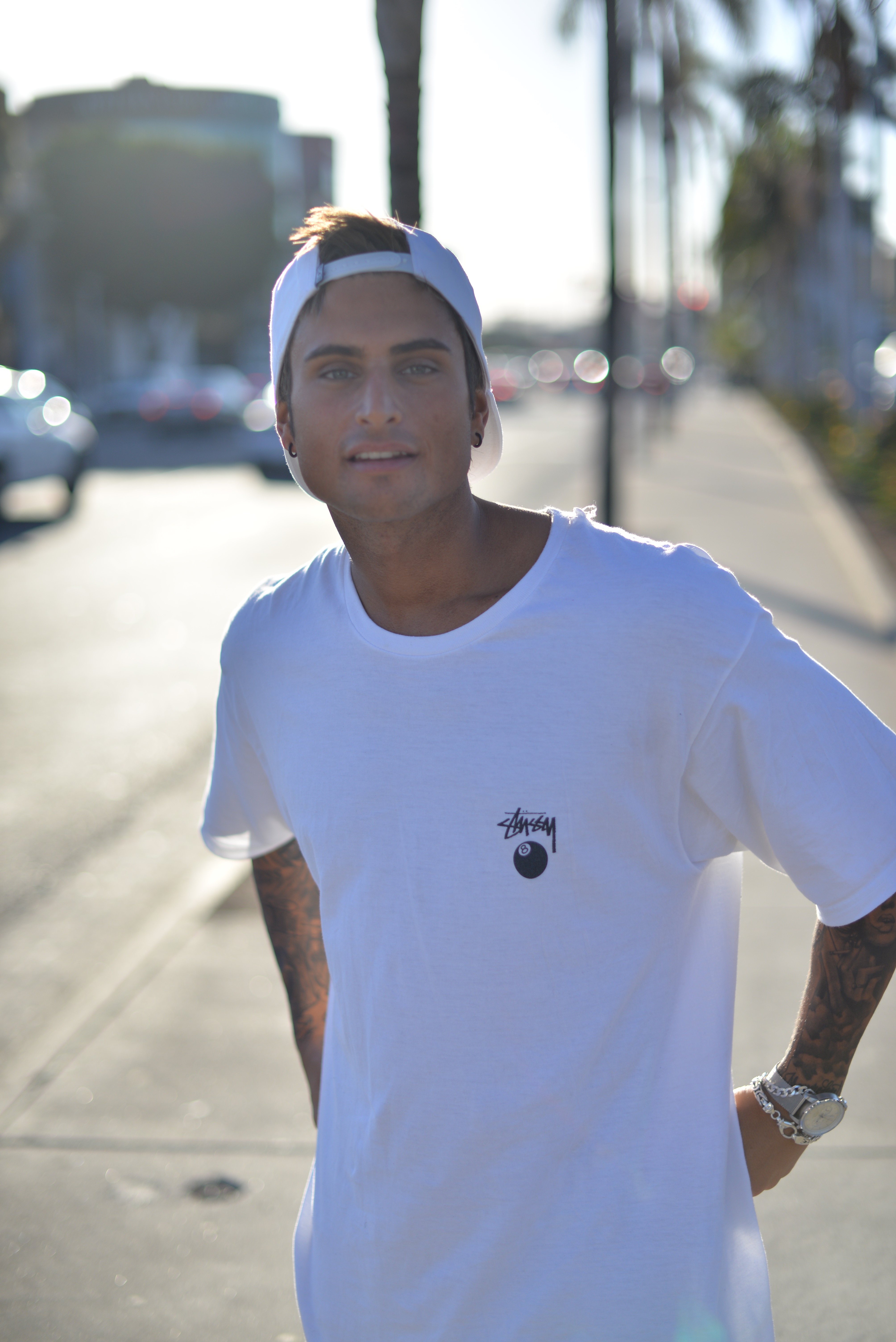 LA